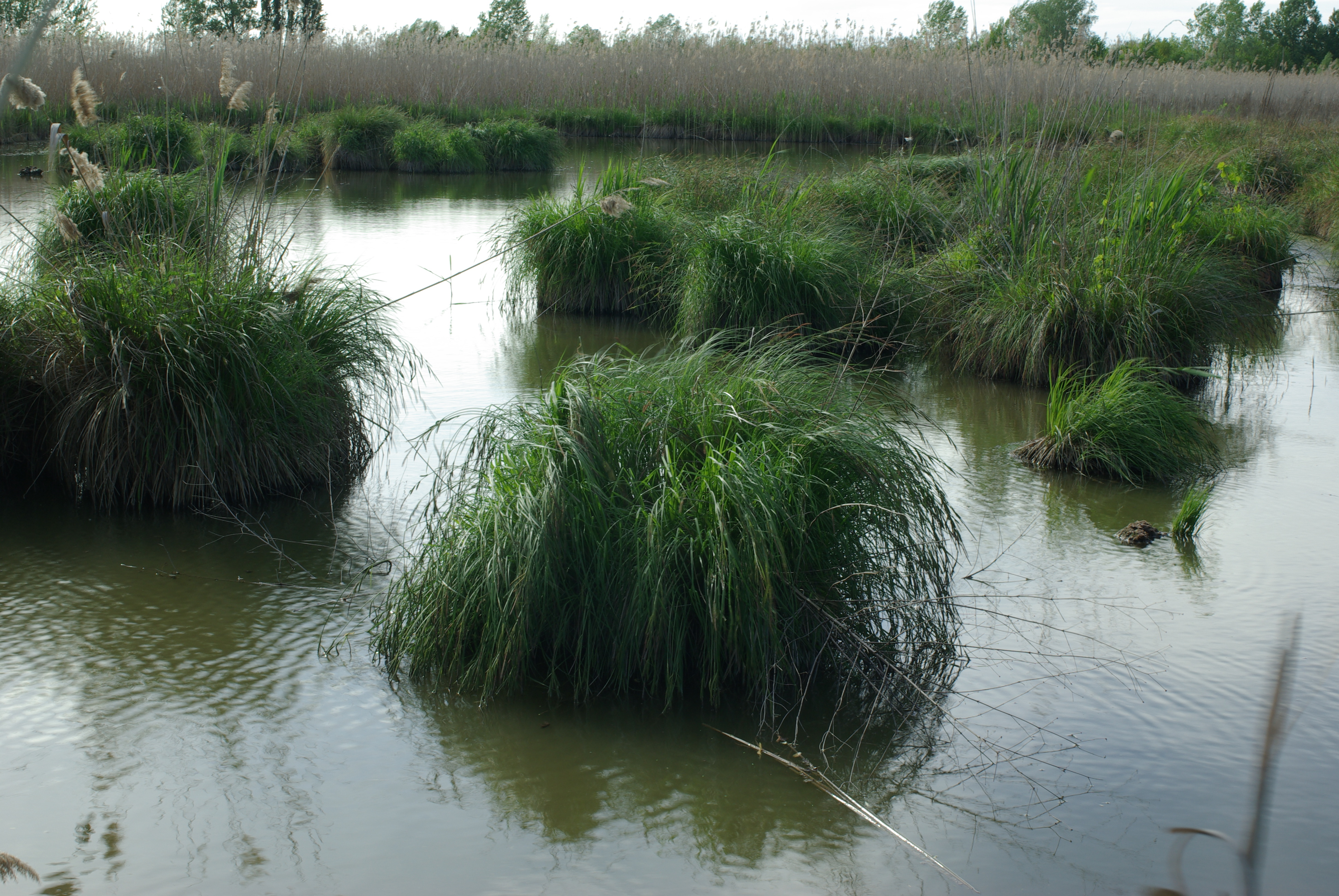 Oasi WWF della Palude del Busatello (Gazzo Veronese VR) Giornata delle Oasi 2012-04-25 photo WWF Verona Paolo Villa